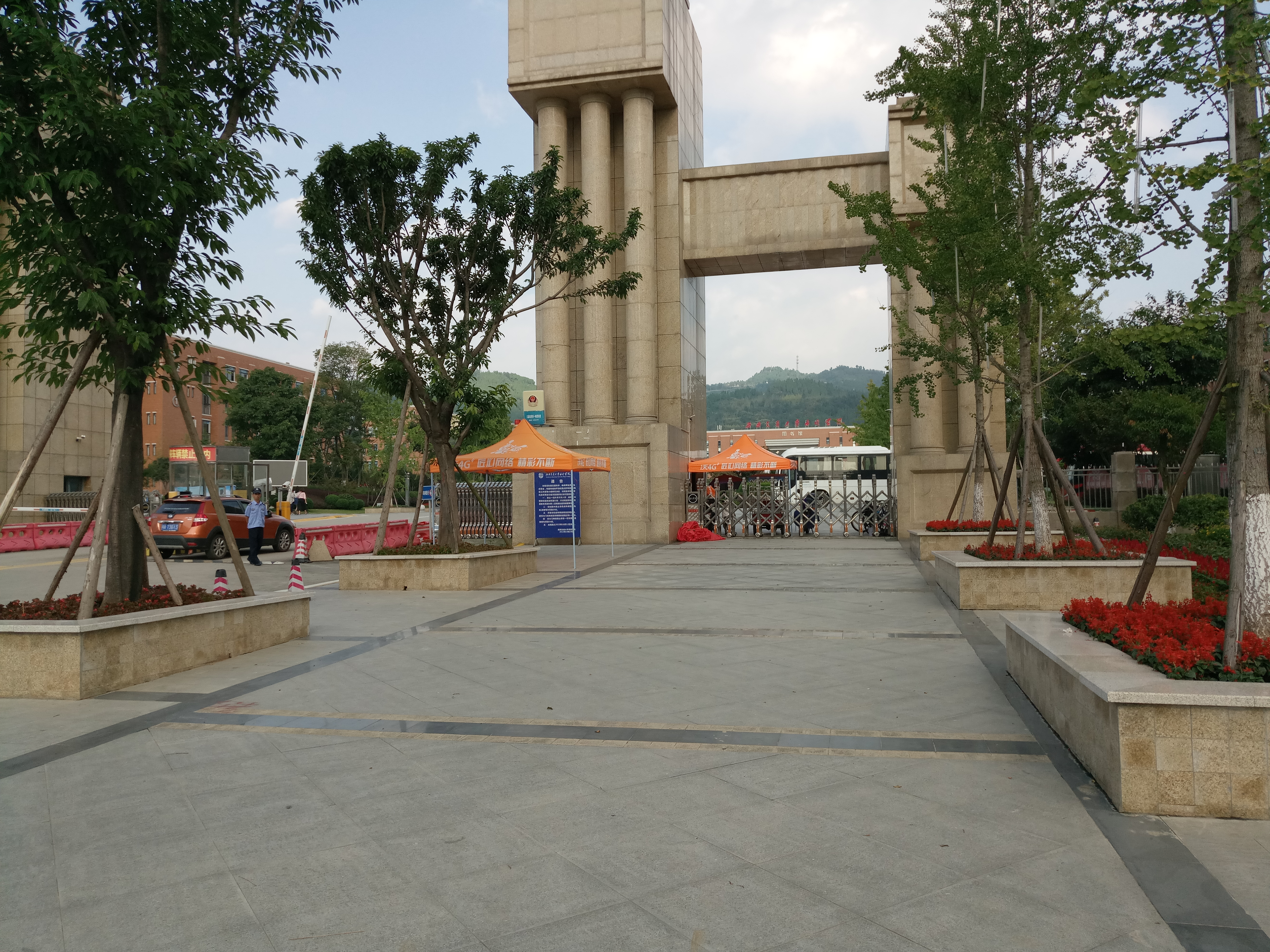 中文（中国大陆）: 西南交大希望学院的校门校门